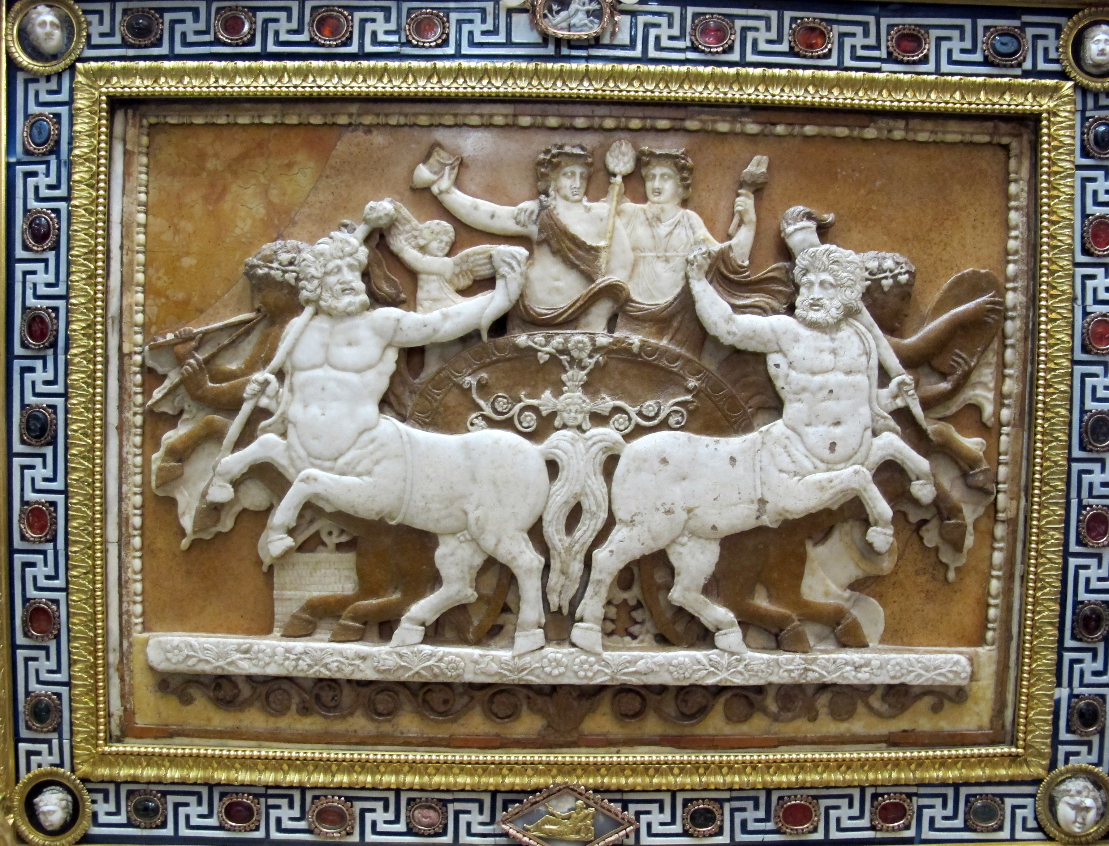 Sala delle Nozze Aldobrandini (Musei della biblioteca Apostolica Vaticana), esposizione temporanea (dicembre 2013) e collezione permanente